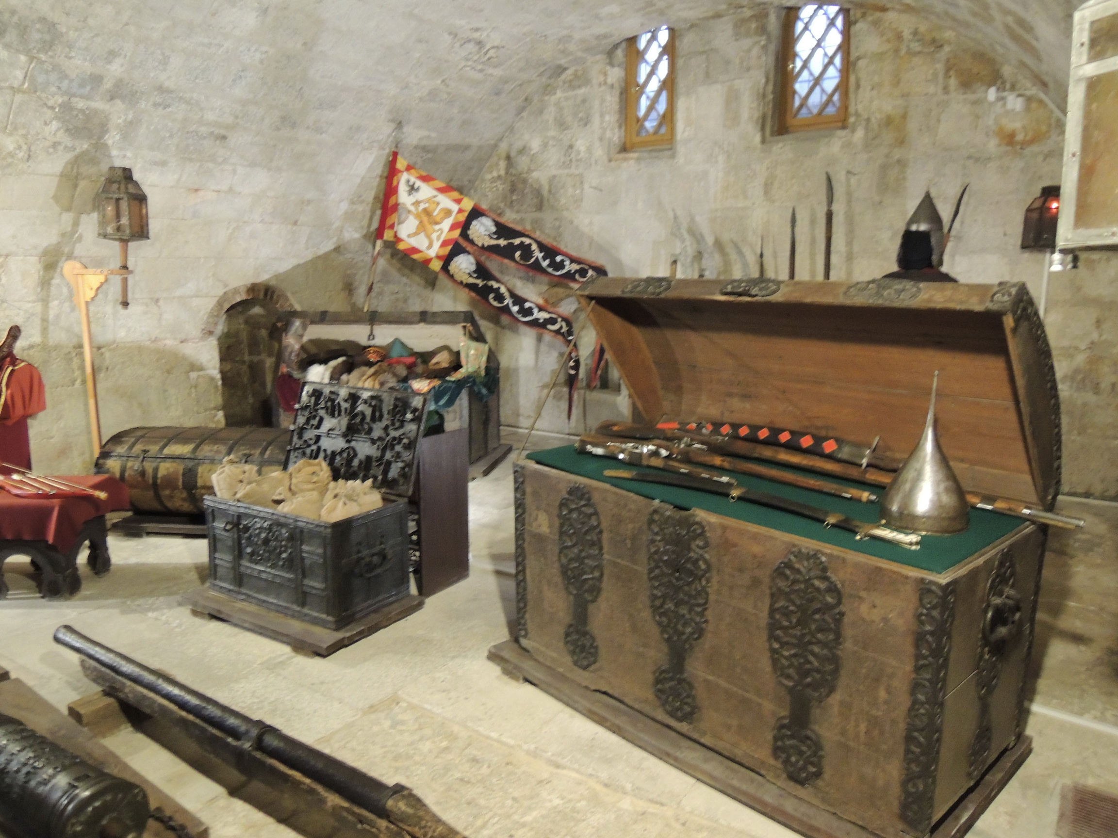 Палаты Романовых